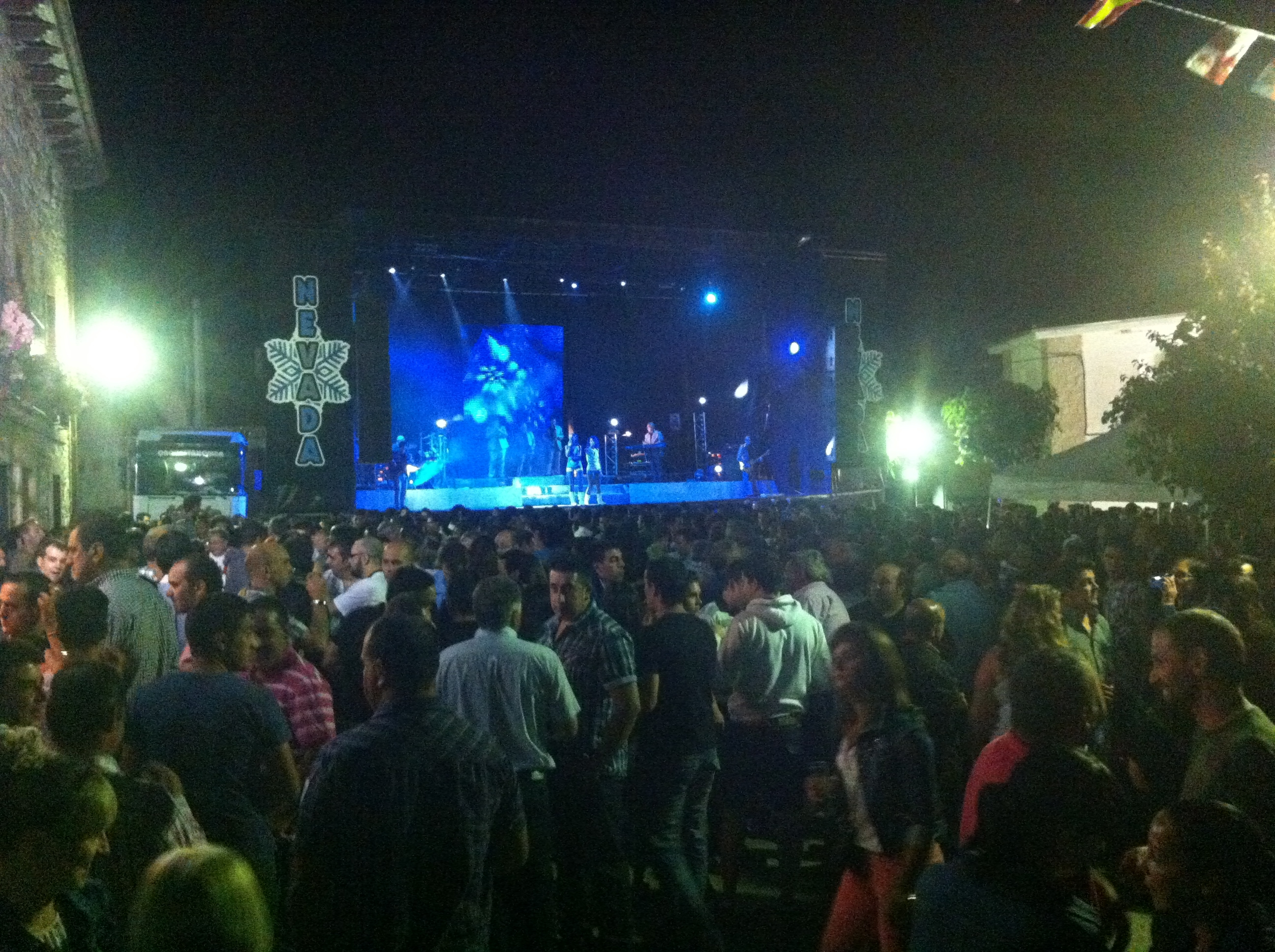 Verbena con motivo de las fiestas de la Virgen del Carmen